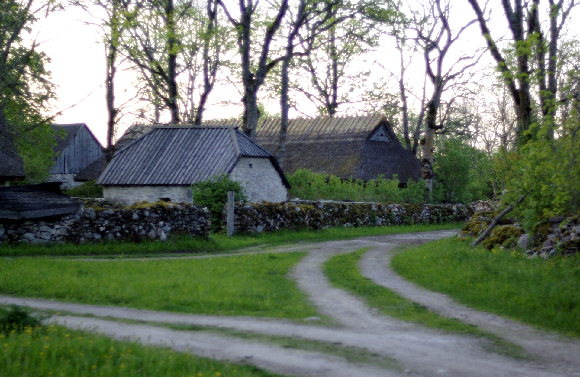 Tüüpiline külavahe Koguvas